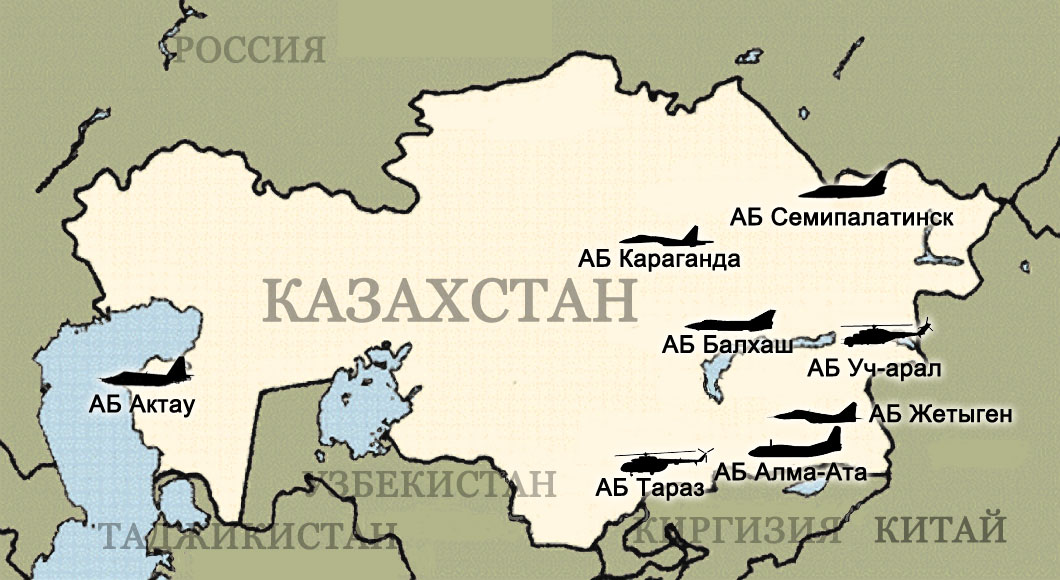 Авиабазы Казахстана